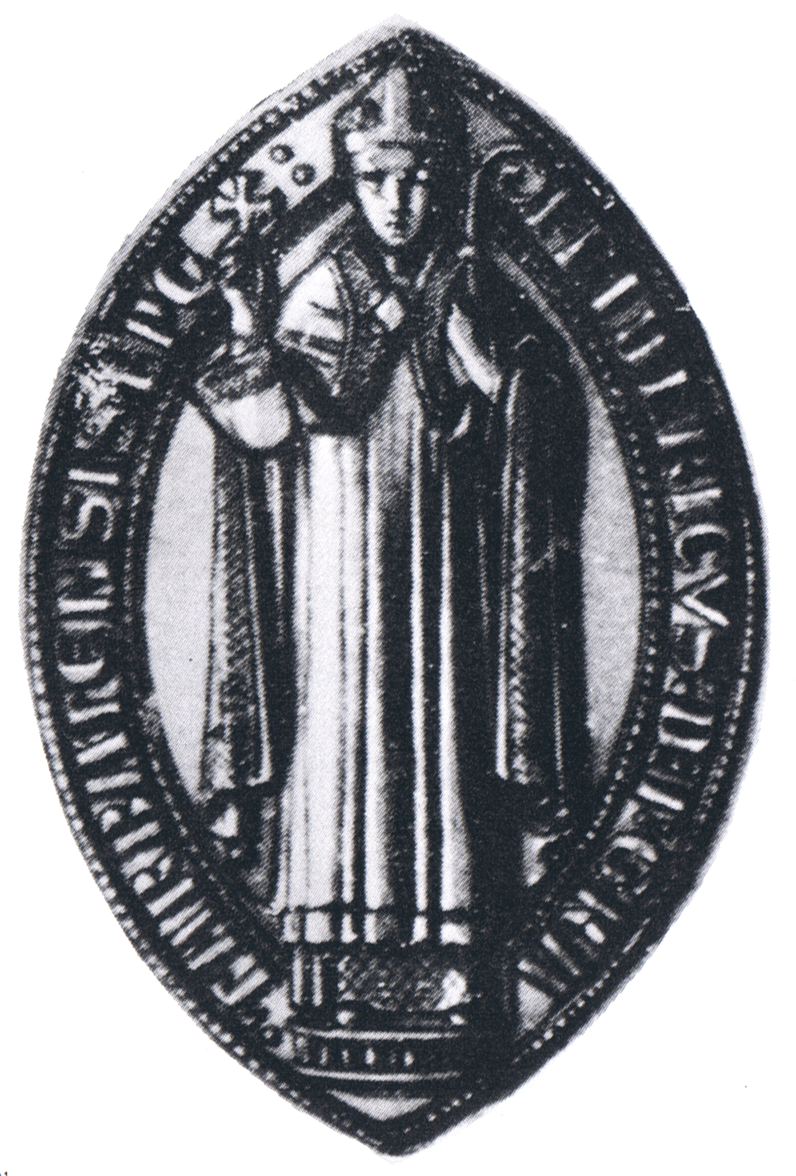 Siegel des Friedrich II von Haseldorf. Das Siegel stammt aus der Zeit um 1278